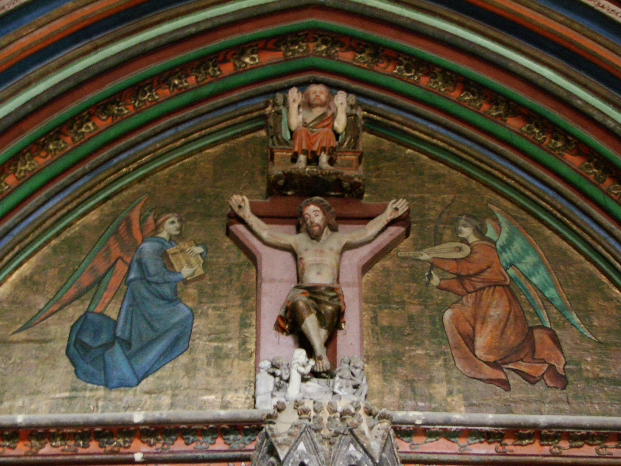 Village de Marciac dans le Gers (France) : Église Notre-Dame de Marciac, détail du portail central avec Christ en croix et anges jouant des instruments de musique